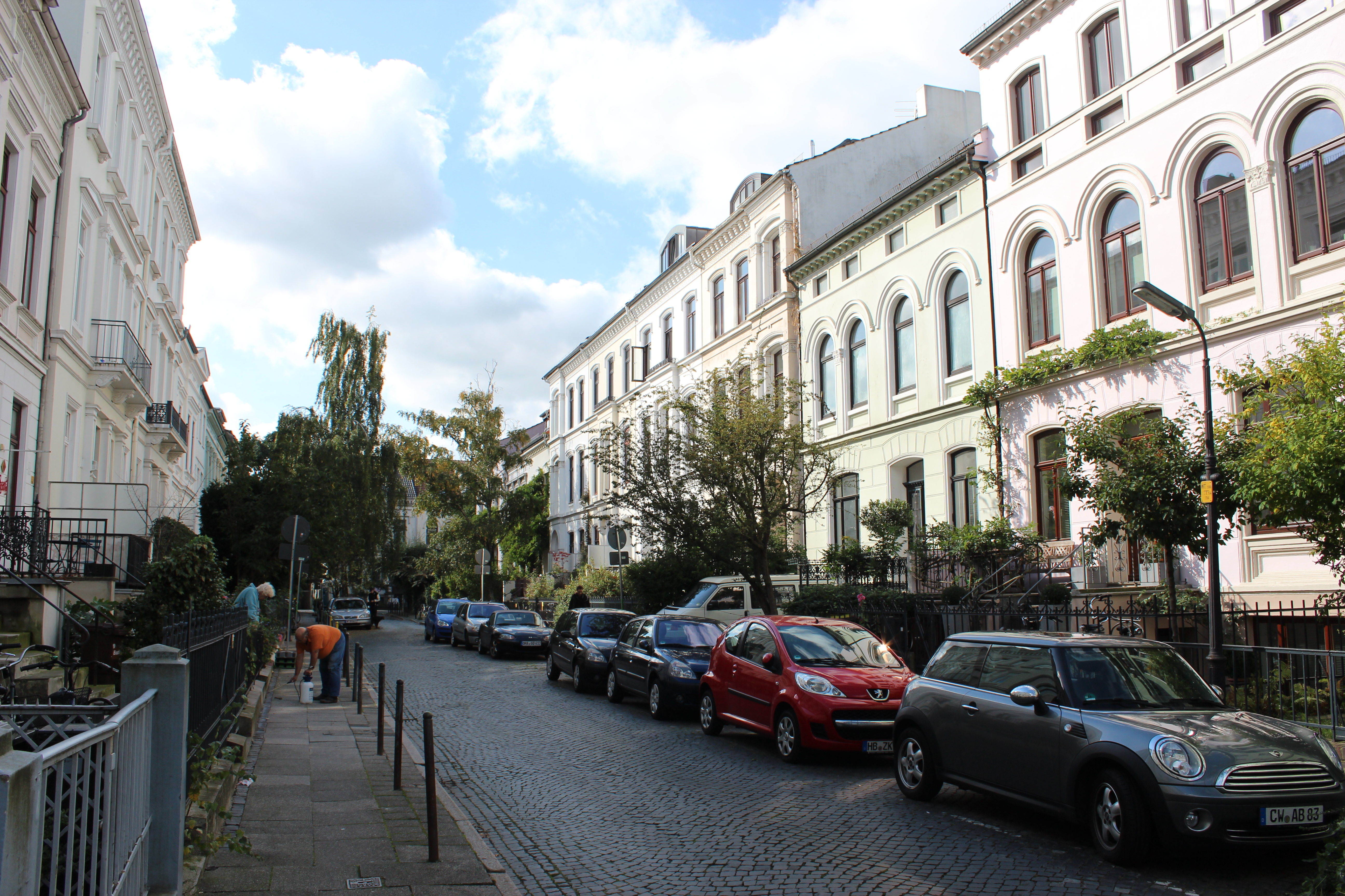 Ensemble Kreftingstraße in BremenDie Denkmalgruppe ist ein geschütztes Kulturdenkmal in der Freien Hansestadt Bremen, mit der Nr. 1423 beim Landesamt für Denkmalpflege registriert.